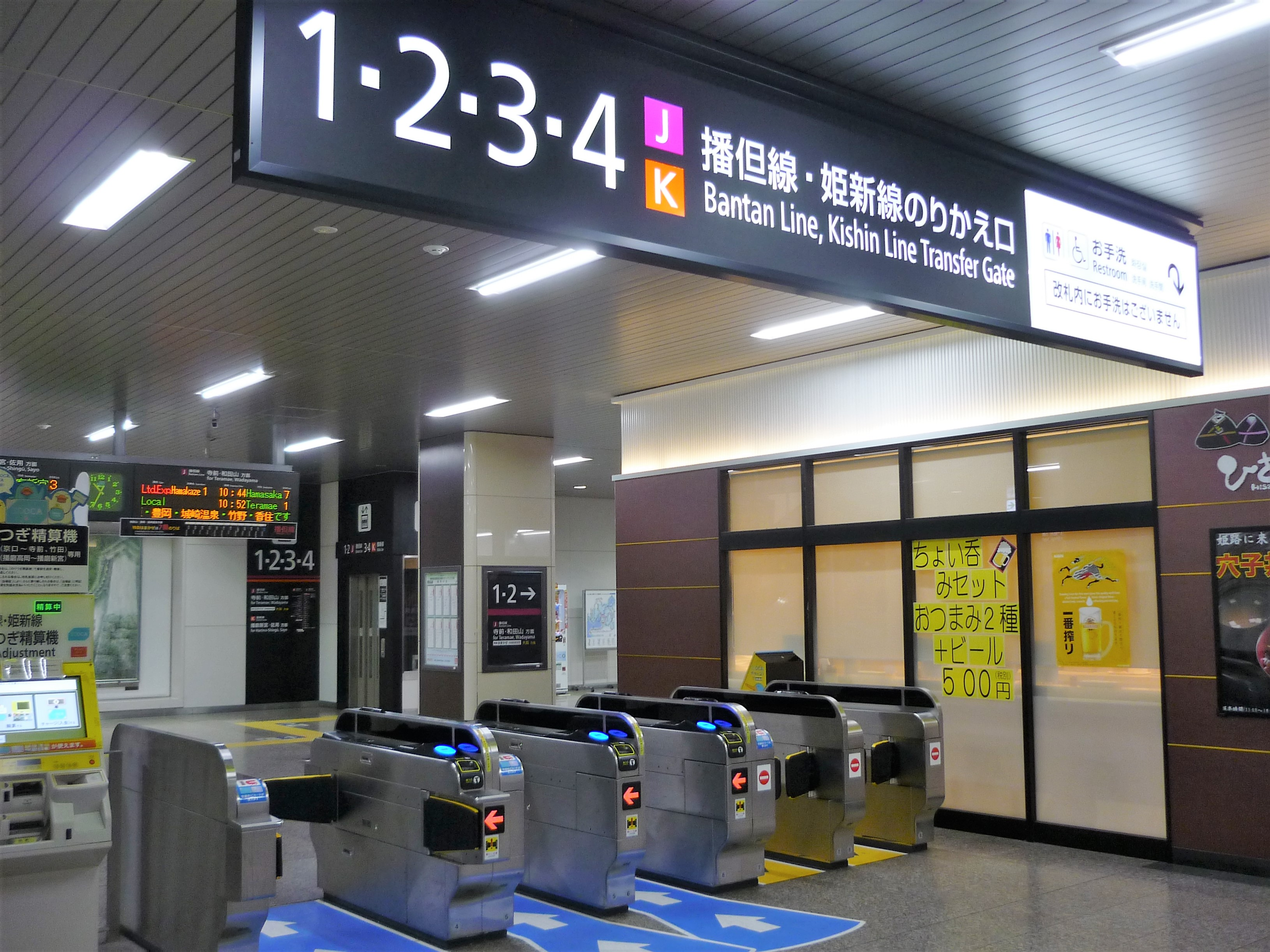 姫路駅の播但線・姫新線乗換改札